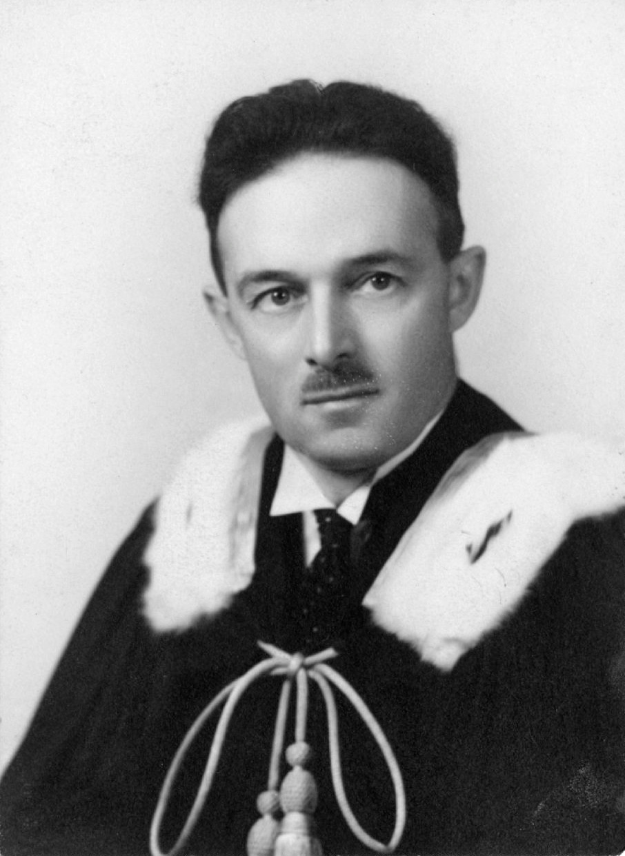 Adrien Pouliot (1896-1980)